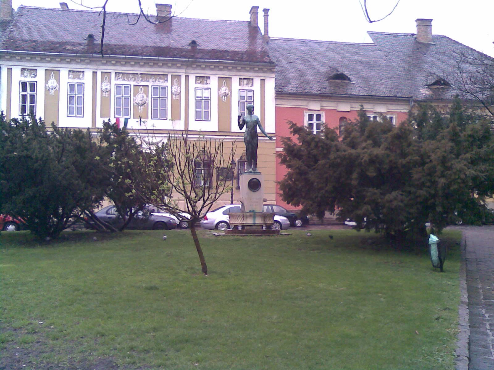 Kazinczy-emlékkút, Budapest, Bécsi kapu tér